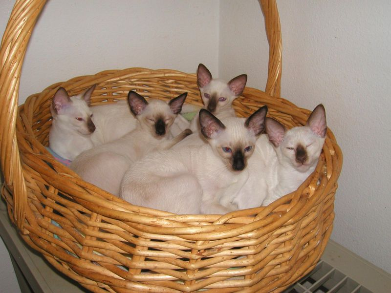 Modern Siamese Kittens